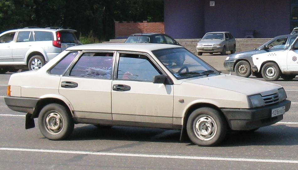 Улица Лежневская, вид на кинотеатр "Лодзь".